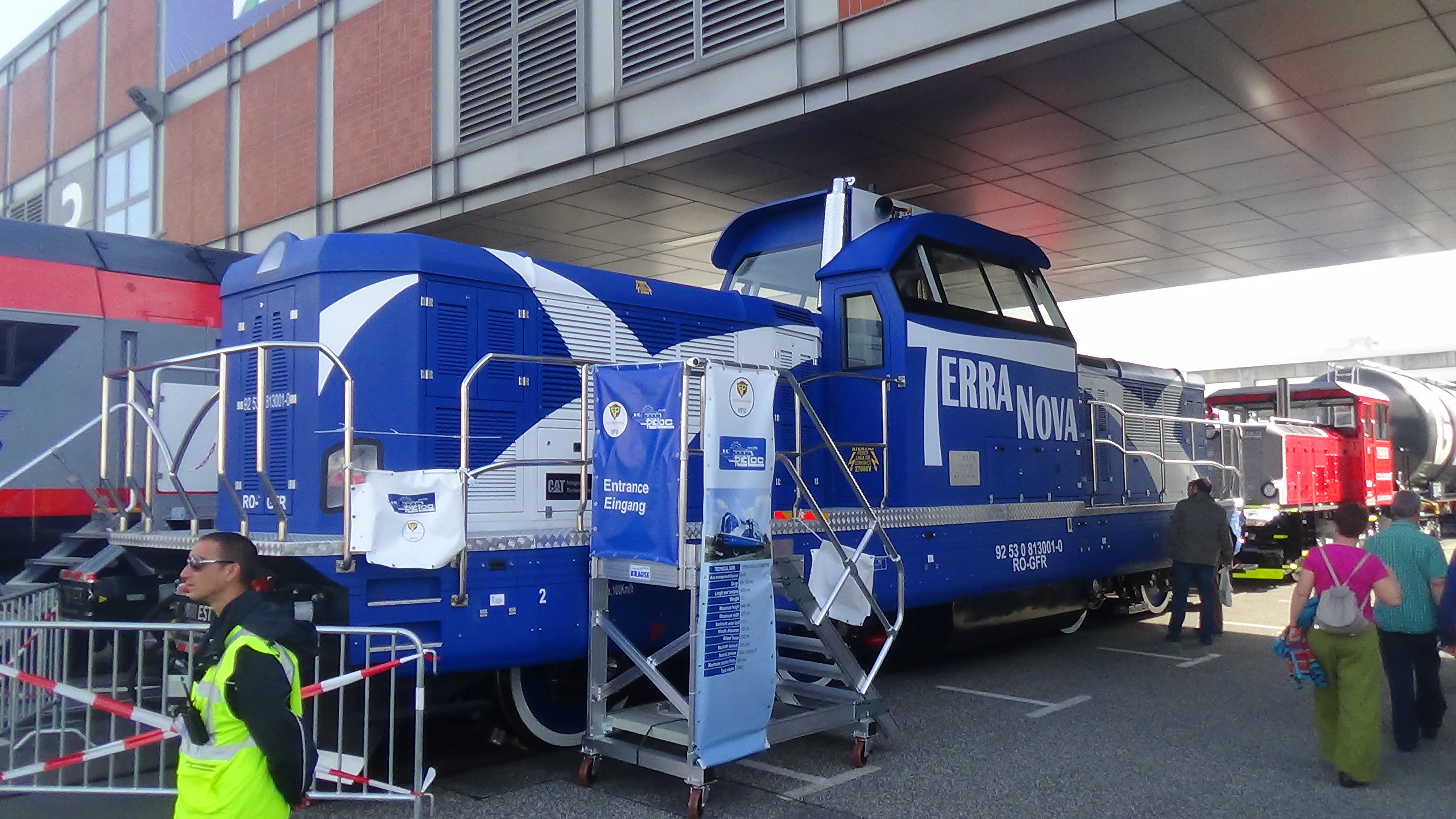 Reloc SA Terranova Locomotive